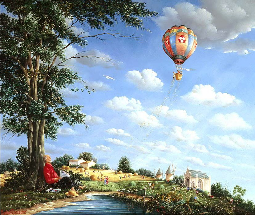 Regard du peintre sur l'an 2000 par le peintre français Raphaël Toussaint.